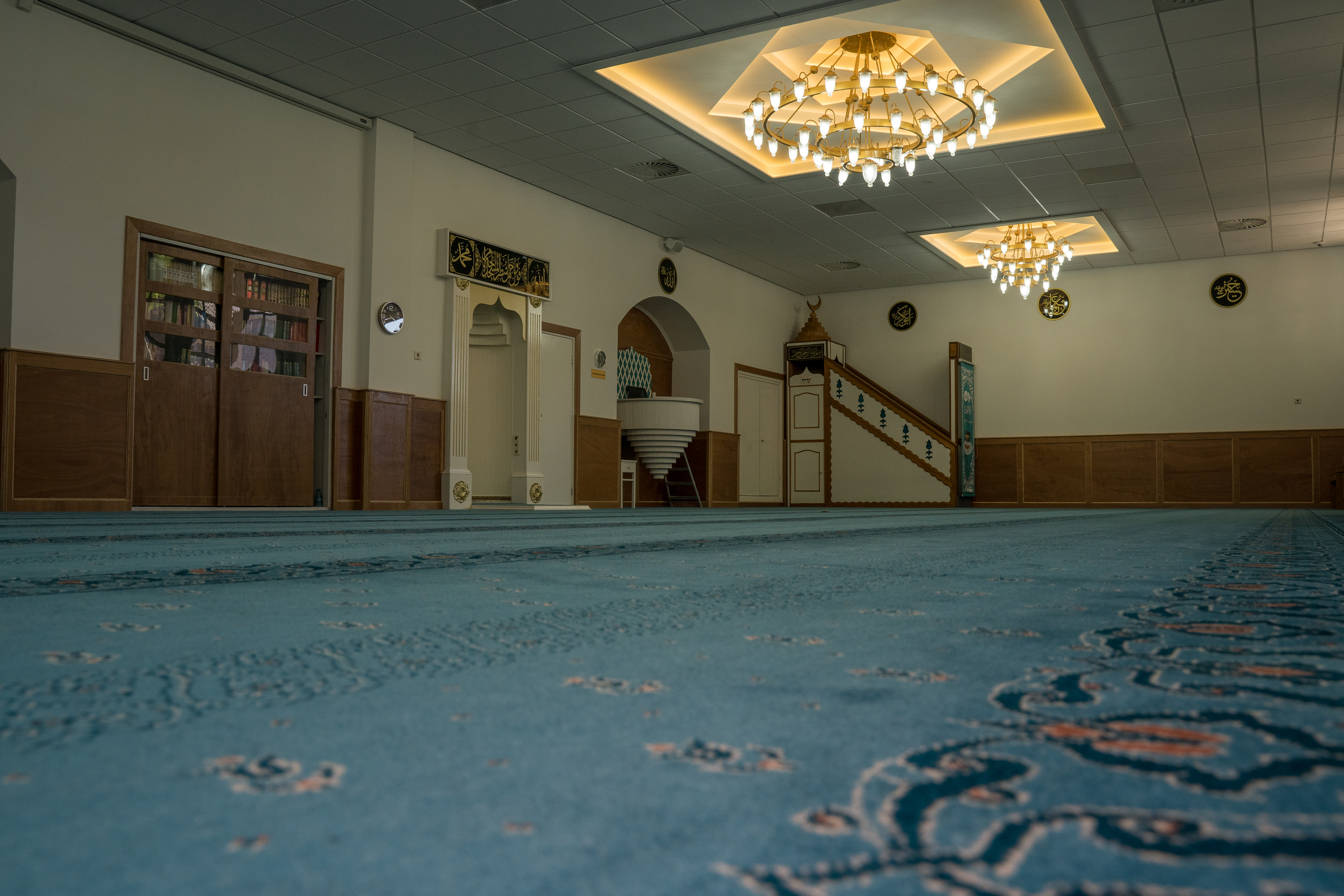 "Milli Görüş is een sociaal-religieuze beweging die zich richt op de integratie en emancipatie van moslims in de Nederlandse samenleving. De beweging heeft in Nederland circa 50 aangesloten organisaties, waaronder de jongeren-, vrouwen- en jonge vrouwenfederatie deel van uitmaken."